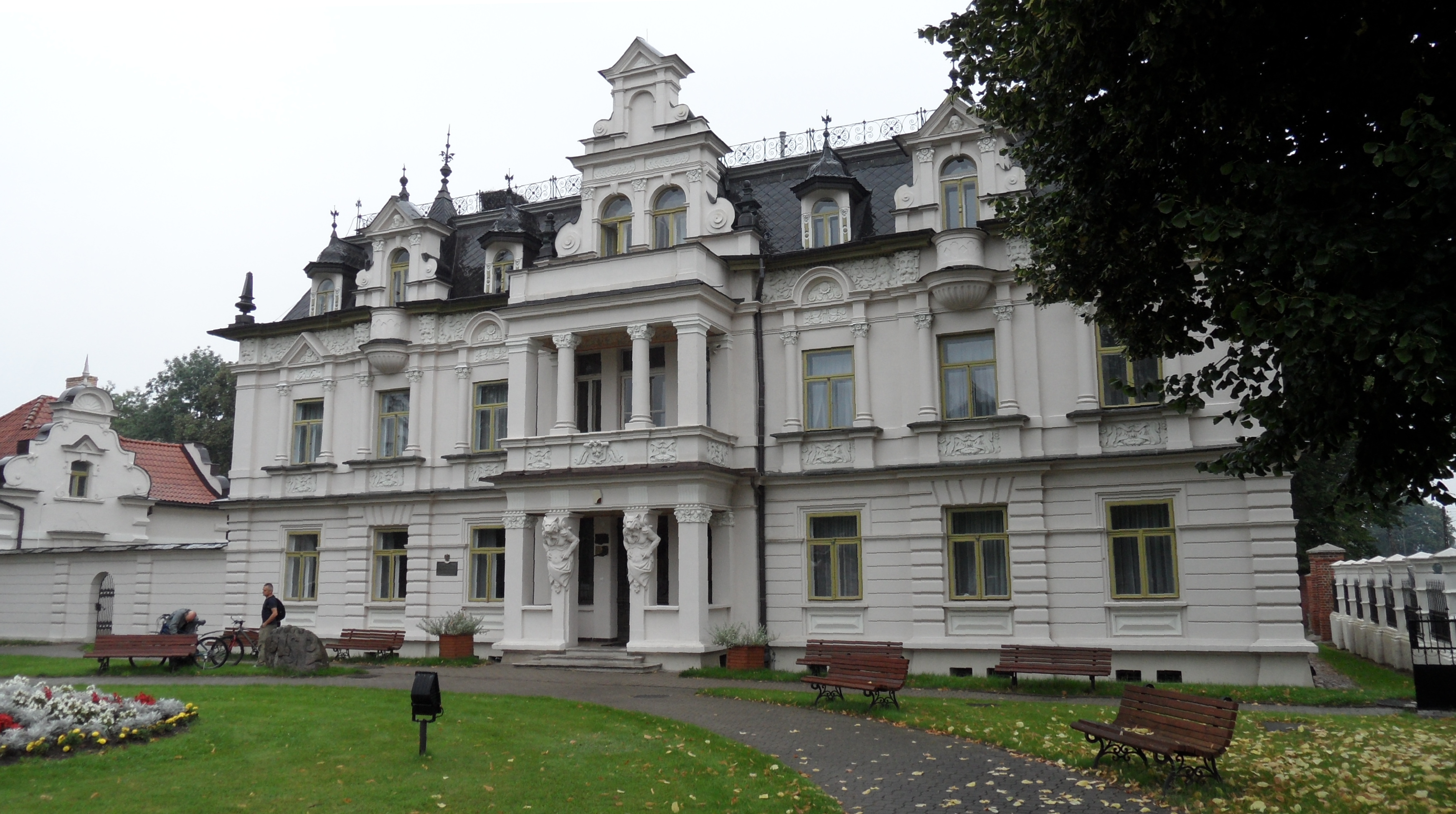 Pałac Buchholtza w Supraślu, obecnie: Liceum Plastyczne 11.1960.